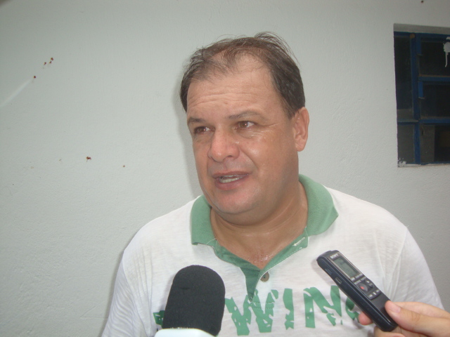 Português de Portugal